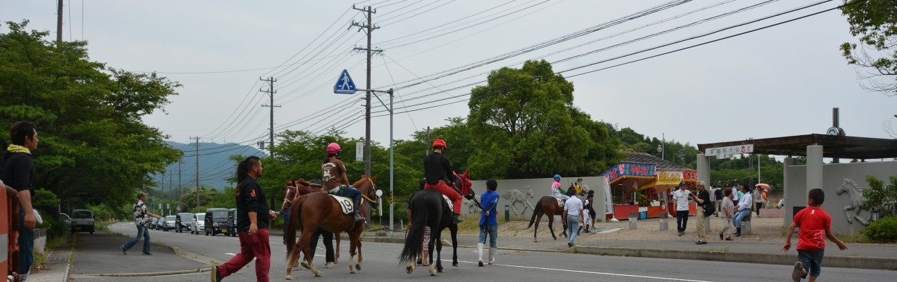 2015年6月14日に三重県桑名市にある「アイリスパークみぞの」で開催された草競馬の大会である「東海愛馬会草競馬大会」にて、道路で分かたれているパドックと会場である本馬場を人馬が往来している風景を撮影したもの。なお種々のプライバシー保護を目的として、意図的に写真の解像度を落としています。